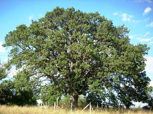 Вековен дъб от село Иванча, Поповско - юли 2008 год. Фото: Вл. Стойков